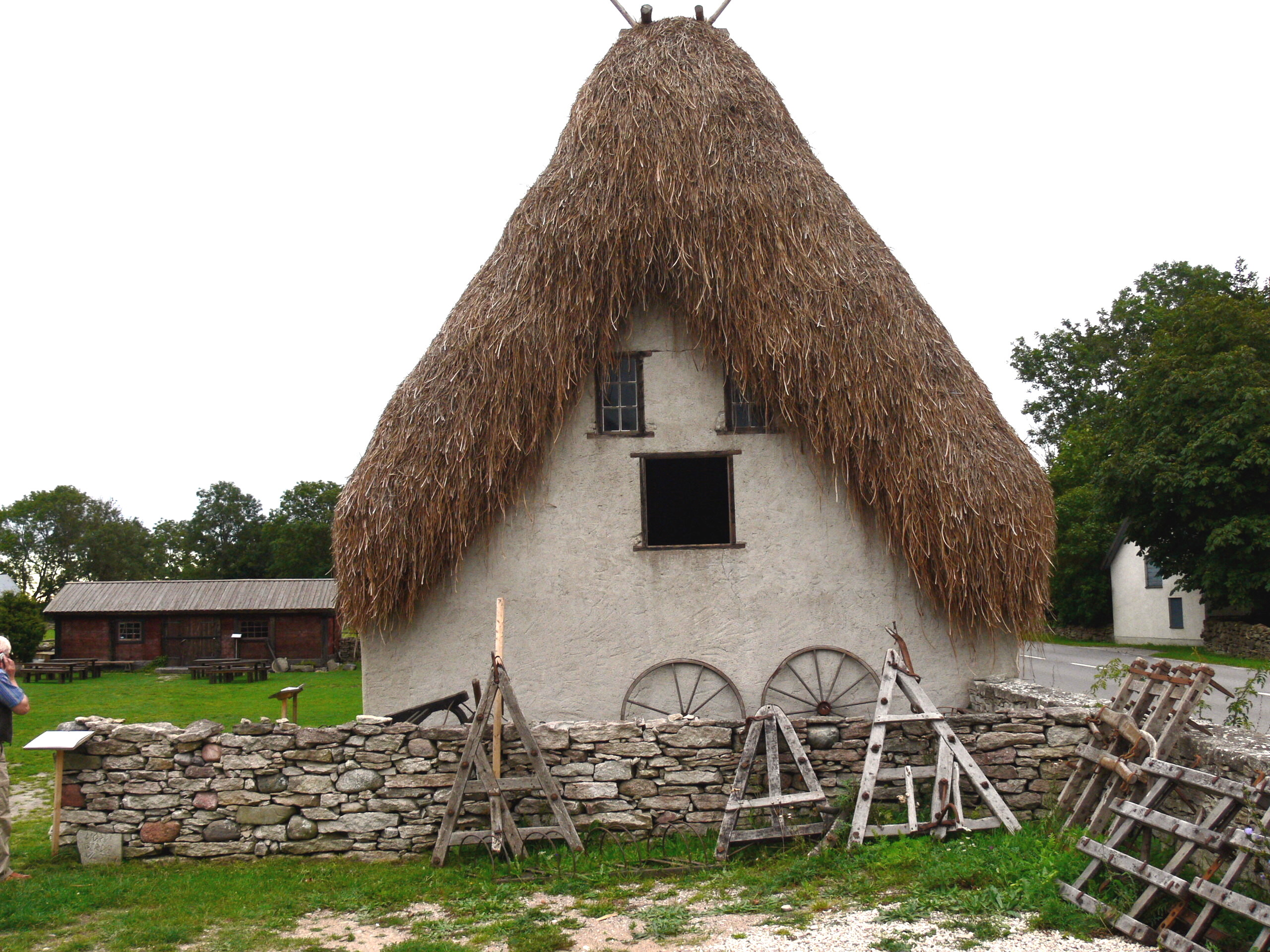 Bottarve Museum auf Gotland. Stall mit Dach aus Schneidried